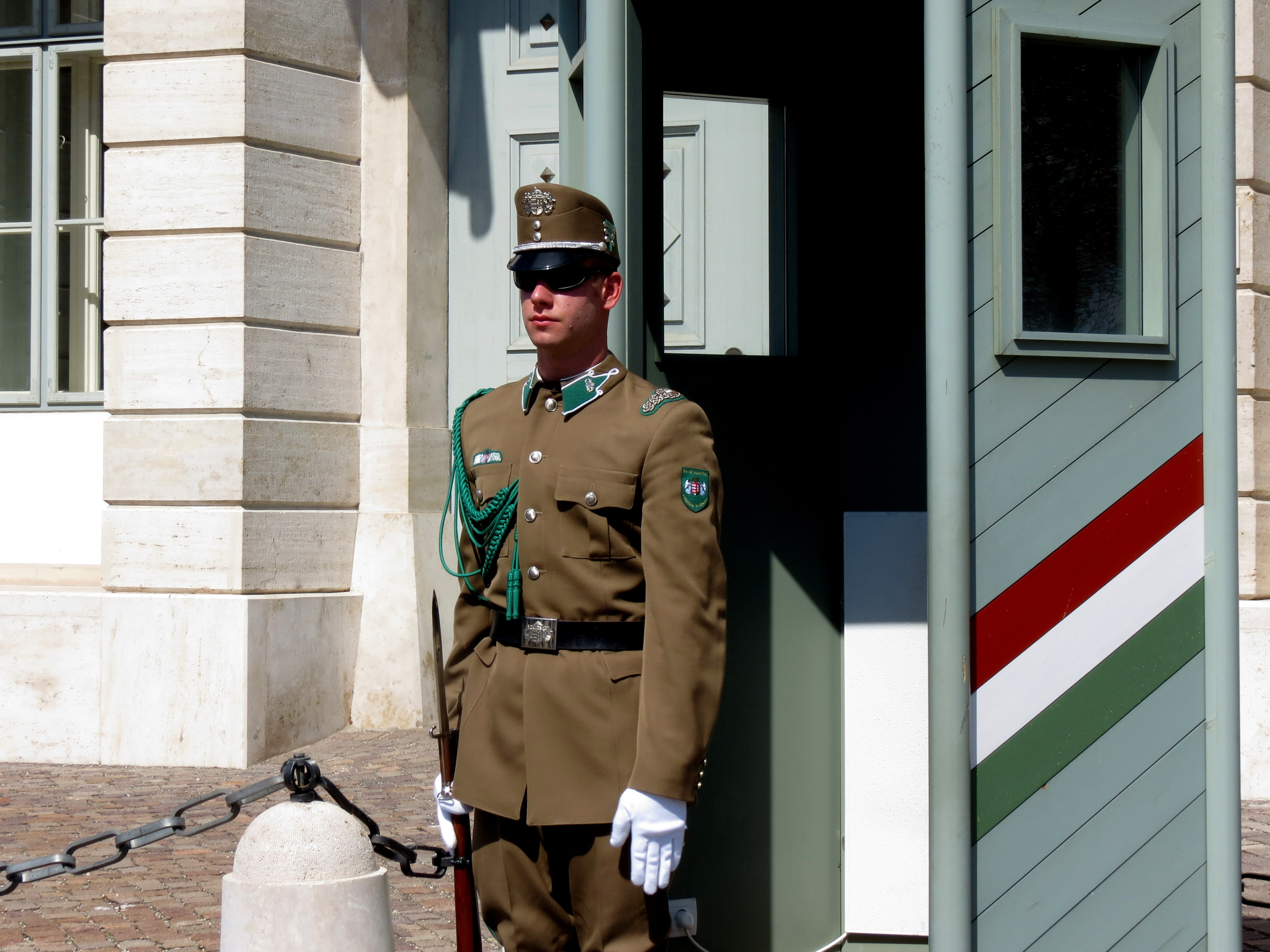 Vue de Budapest.